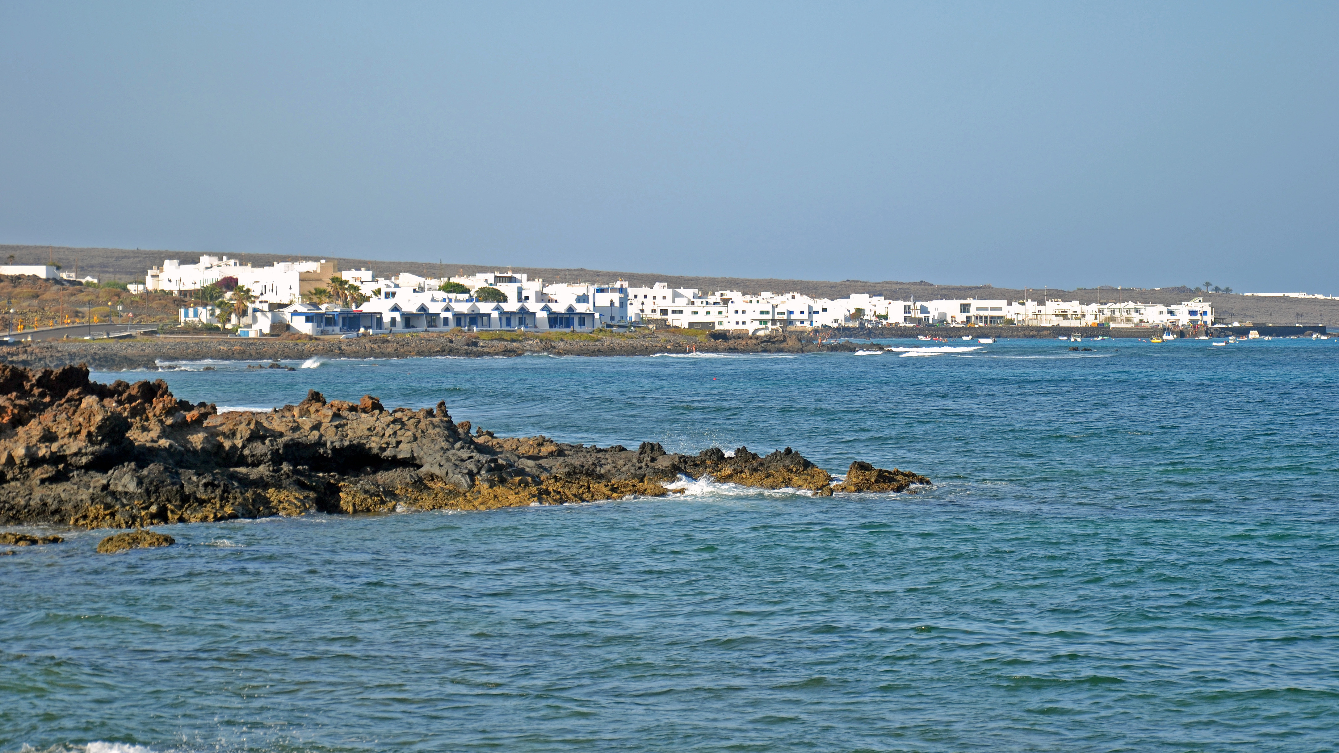 Punta Mujeres, Lanzarote, Kanarische Inseln - Blick von Süden